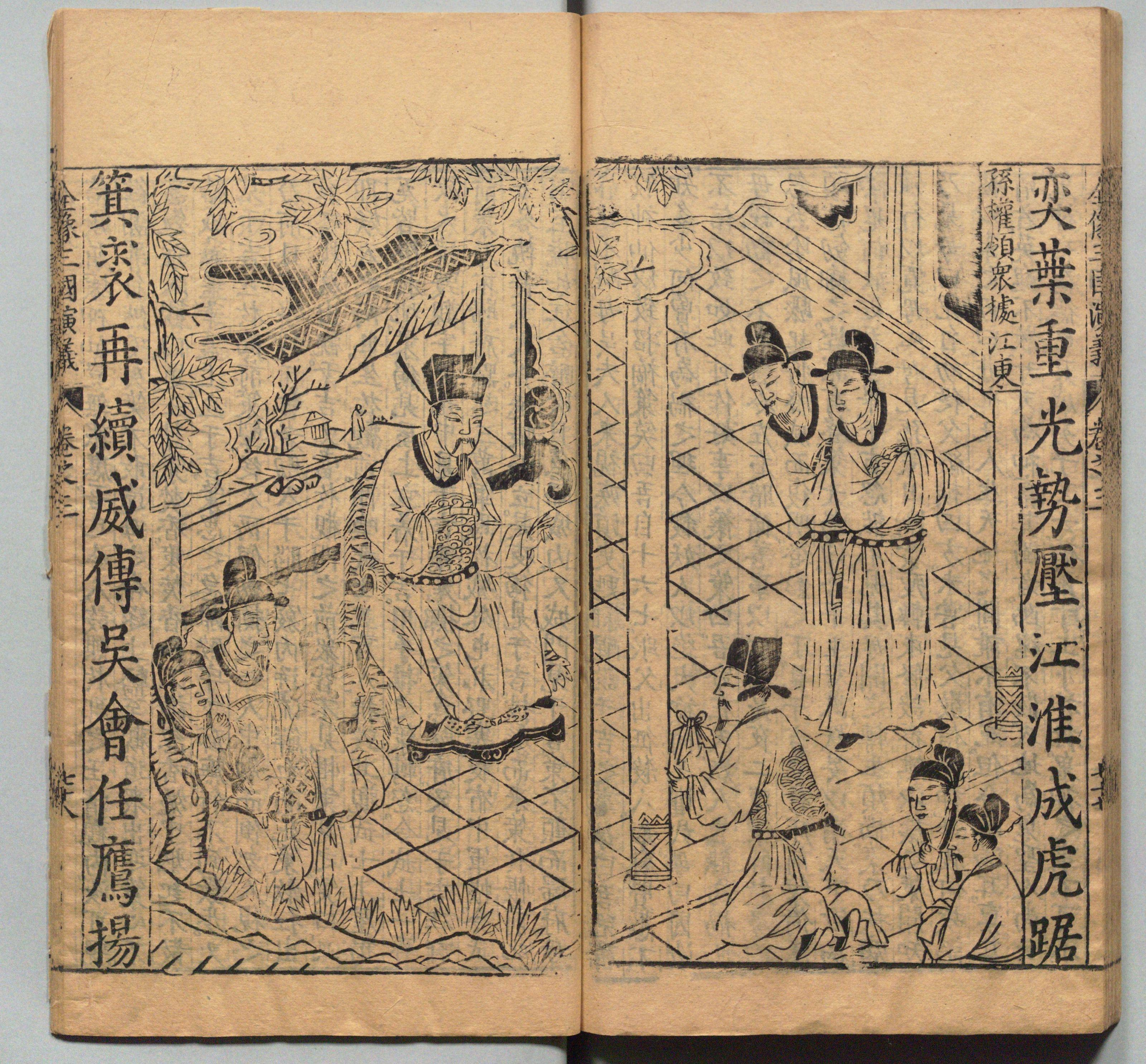 新刊校正古本大字音释三国志通俗演义 明万历十九年书林周曰校刊本